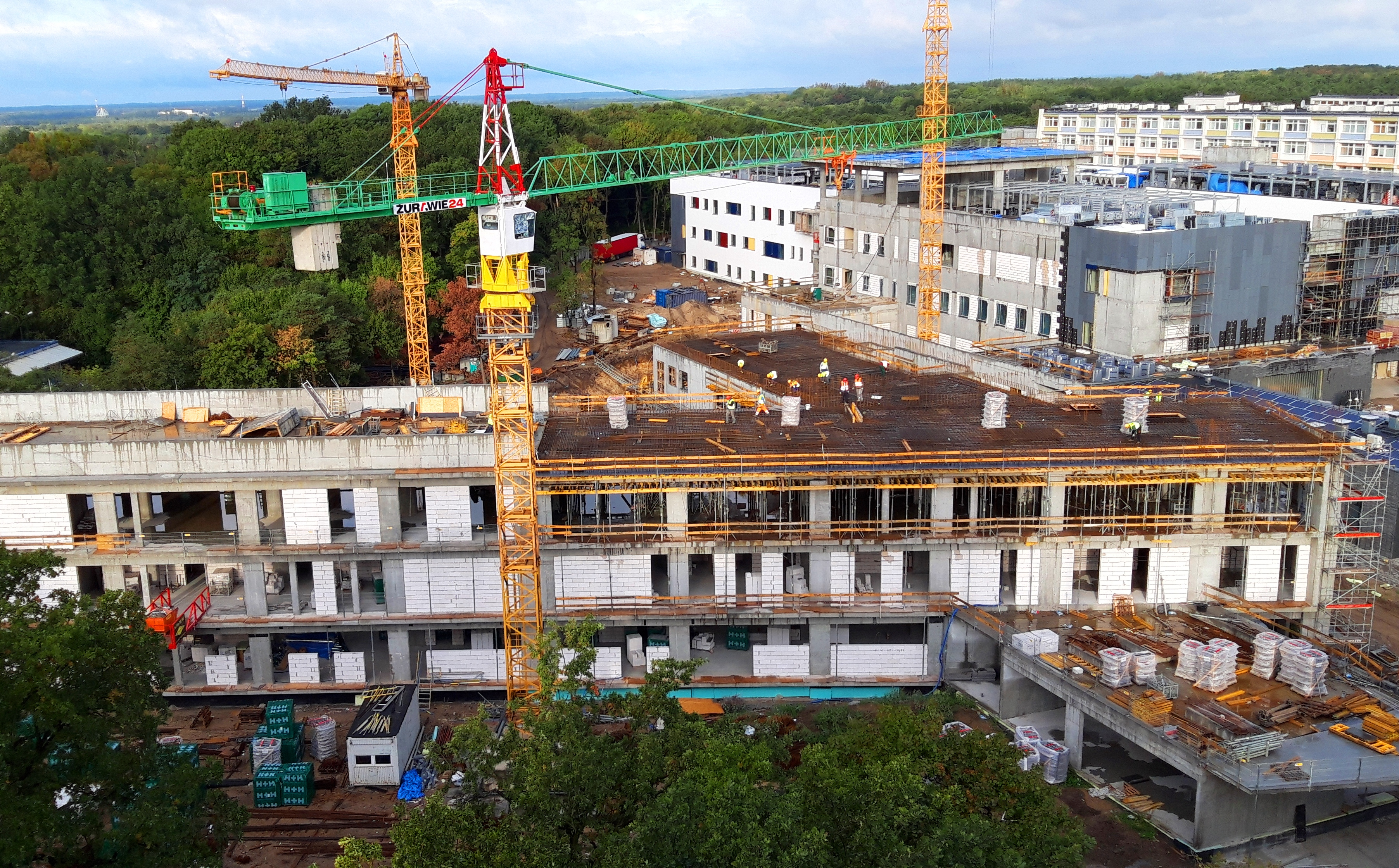 Budowa Szpitala Psychiatrycznego w Toruniu2